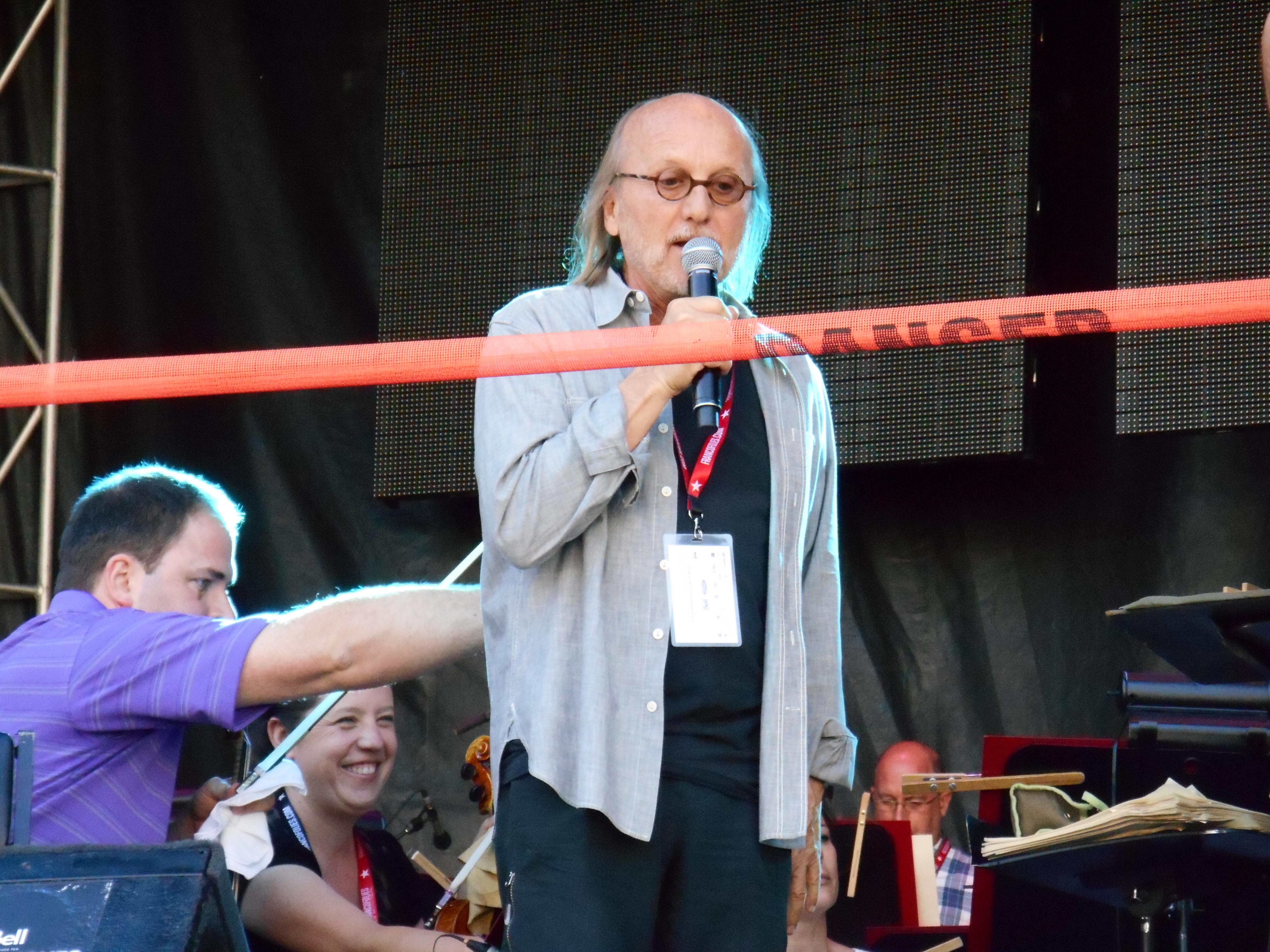 Jim Corcoran Répétition du spectacle La symphonie rapaillée, offert dans le cadre des FrancoFolies de Montréal, le 22 juin 2014